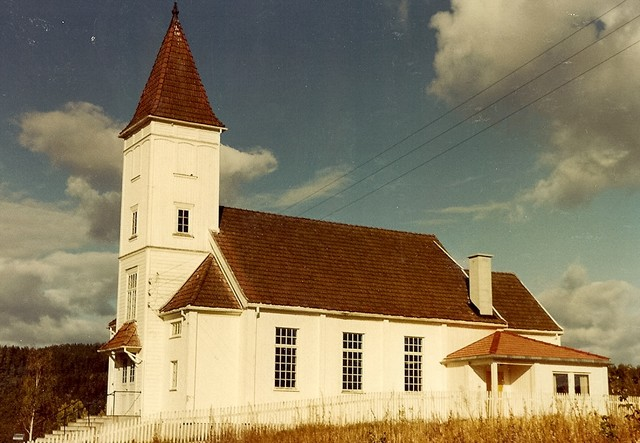 Bingen kapell